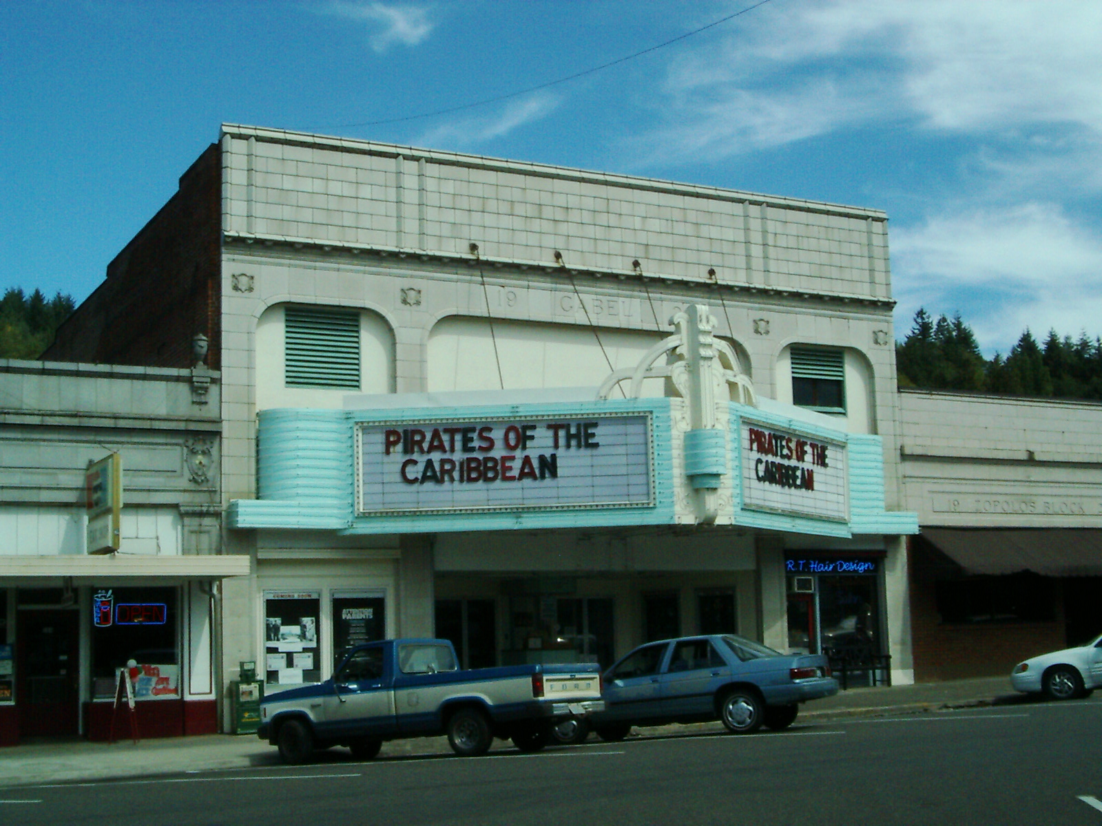 Kino am South Market Boulevard in Chehalis, Washington Sonstiges: ...